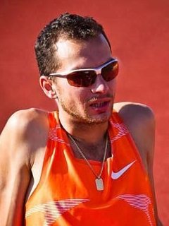 Minczér Albert magyar középtávfutó